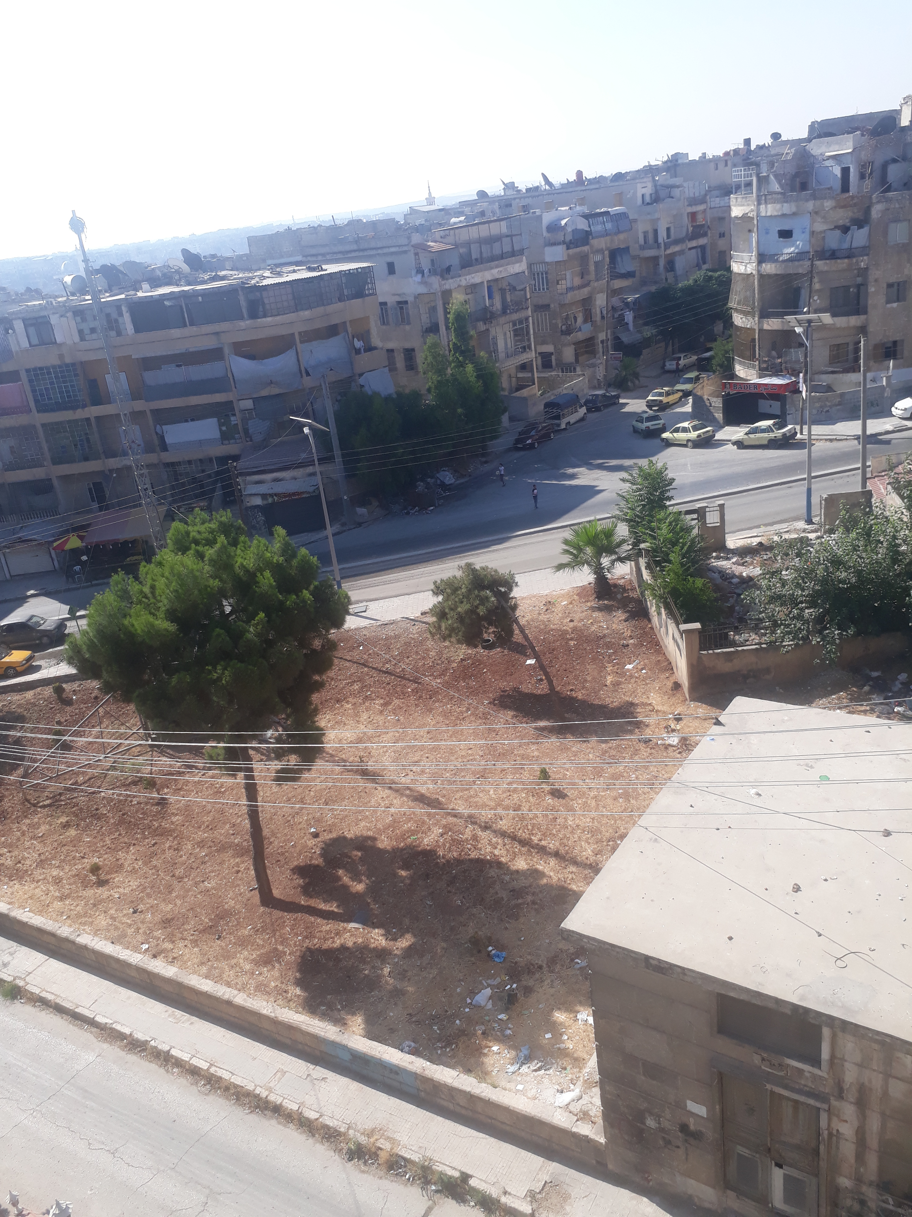 حي الزبدية